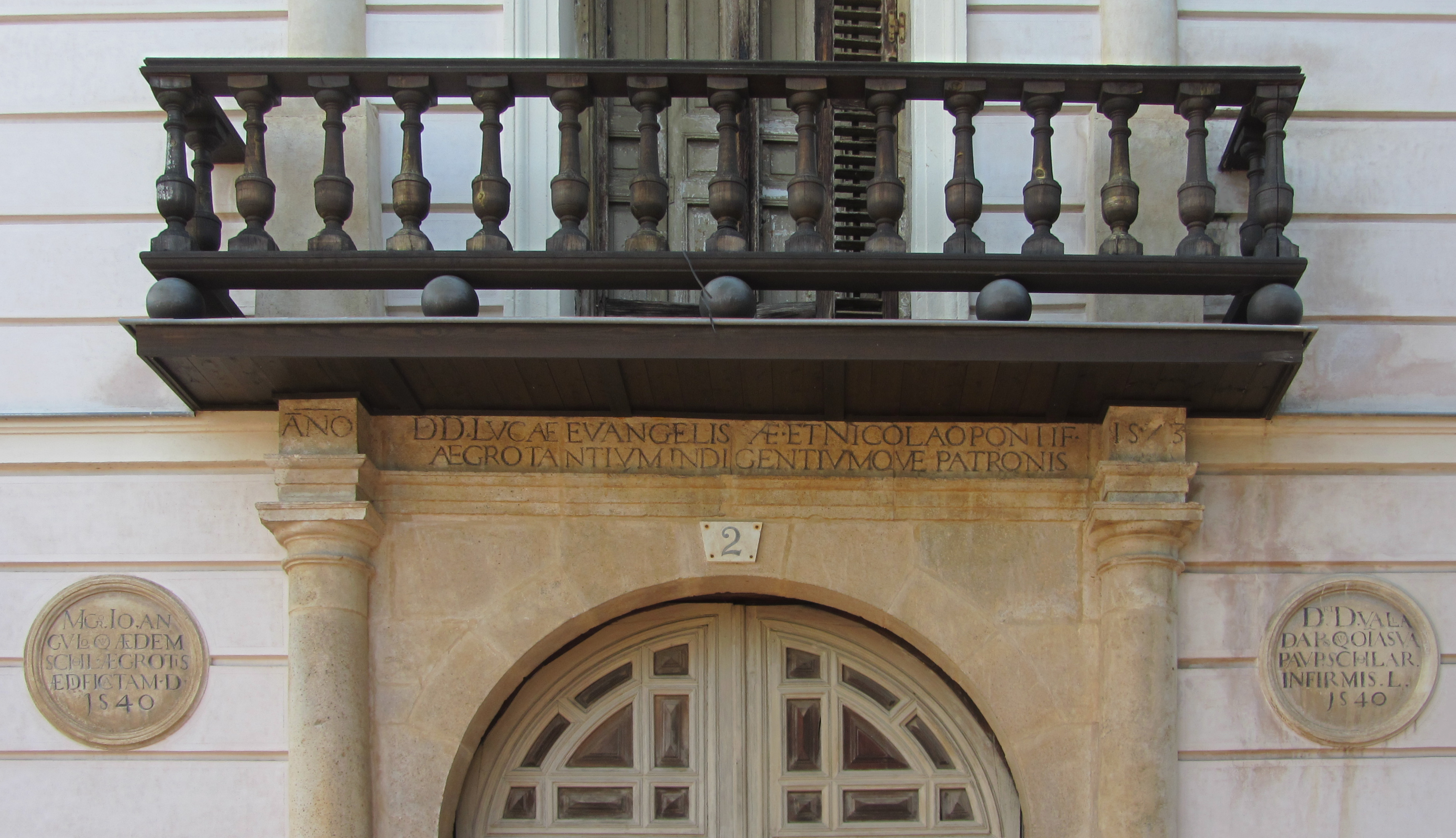 Detalle del pórtico del antiguo Hospital de San Lucas y San Nicolás de Alcalá de Henares (Comunidad de Madrid - España). Fundado por el Cardenal Cisneros en 1513, y puesto en funcionamiento en 1540 por Juan de Angulo. Como elementos decorativos de la fachada se presentan, en piedra, dos medallones y un friso con inscripciones históricas. En el medallón norte se puede leer: "MAGTRO IO ANGULO QUI AEDEM SCHOL AEGROTIS AEDIFICATAM D 1540" (traducción: "Al maestro Angulo, que dio la casa ya edificada a los estudiantes enfermos, año 1540"). Y en el medallón sur: "DRI D VALLADARO QUI OI SUA PAUP SCHOLAR INFIRMIS L 1540" (traducción: "Al doctor Valladares, que legó todo lo suyo a los escolares pobres enfermeros, 1540"). En el dintel sobre la puerta principal, la inscripción recuerda a los patronos del hospital: "ANO 1573 D D LUCAE EVANGELISTAE ET NICOLAO PONTIF AEGROTANTIUM INDIGENTIUMQUE PTRONIS" (traducción: "Año 1573, a nuestros patrones Lucas Evangelista y Nicolás Pontífice, patrones de los enfermos y de los necesitados").